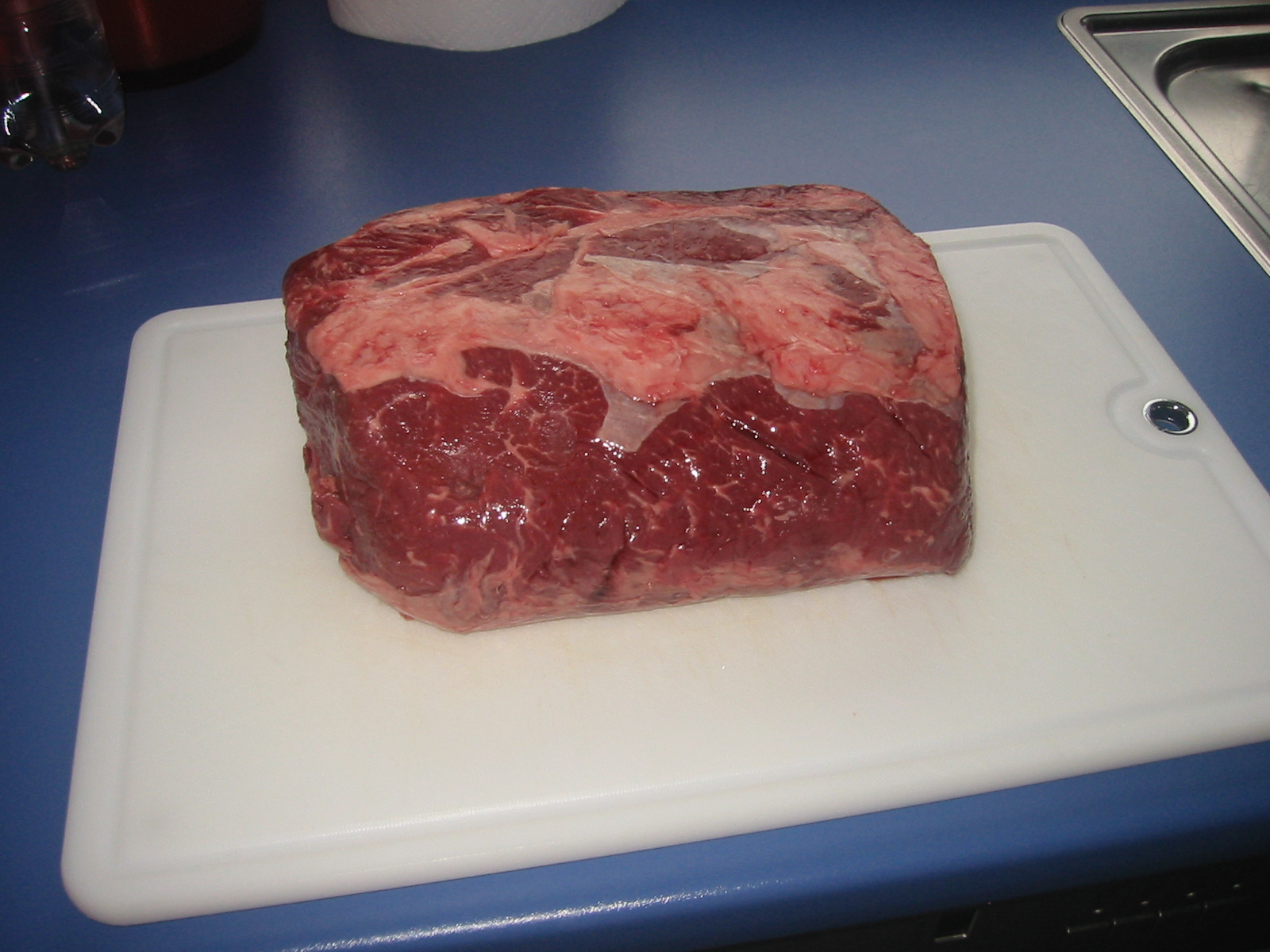 Entrecote am Stück.